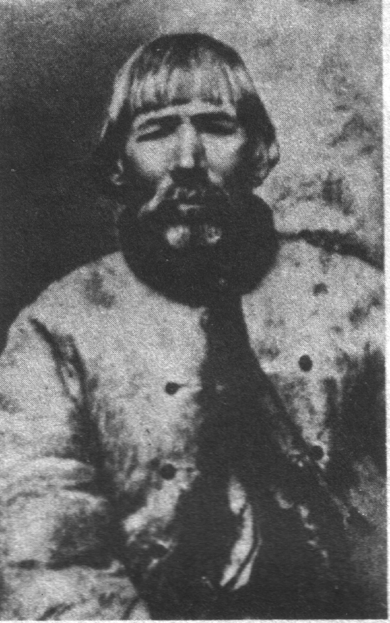 Семен Стефаник: фото батька Василя Стефаник